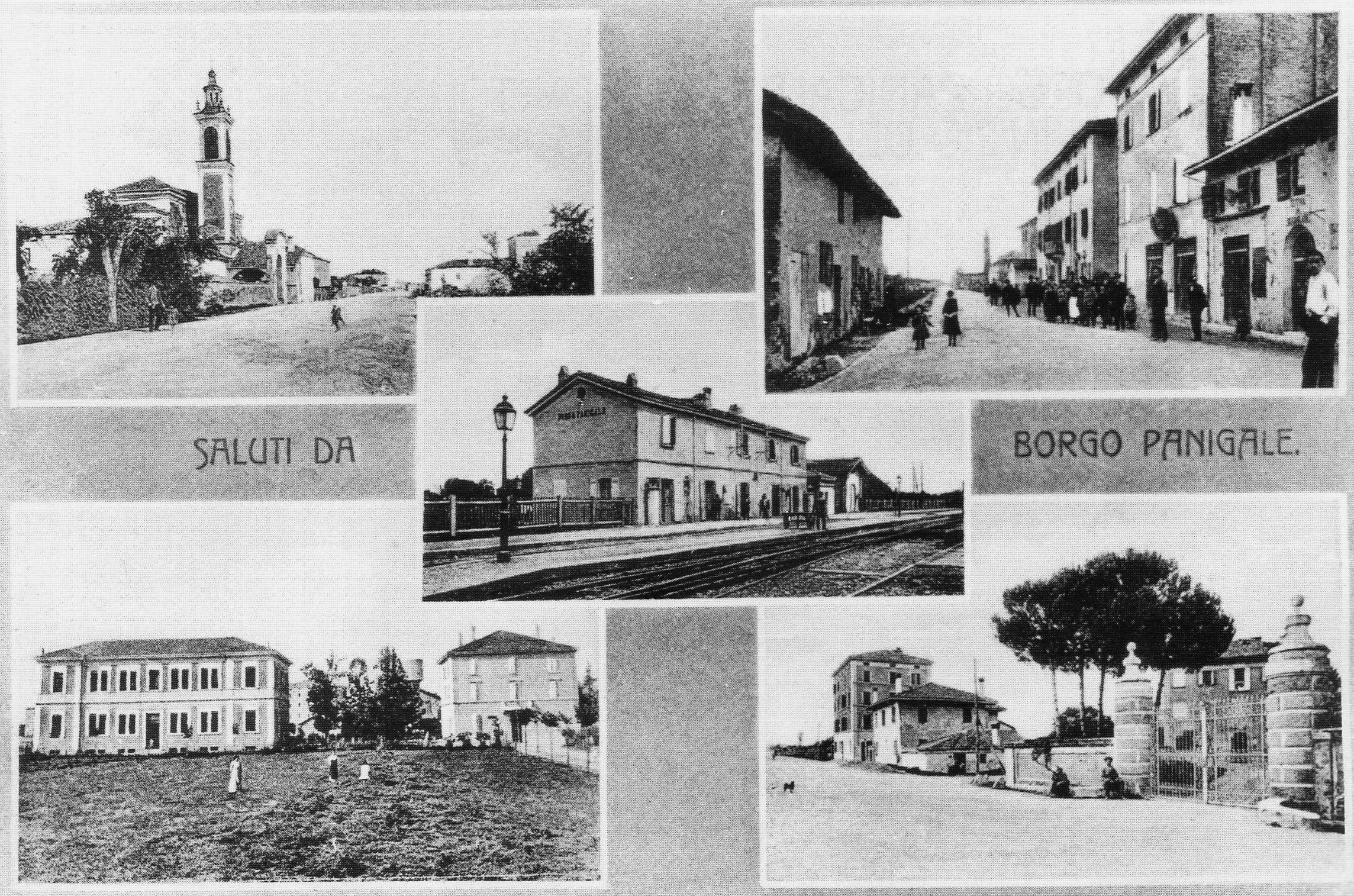 Vedute di Borgo Panigale tratte da una cartolina d'epoca